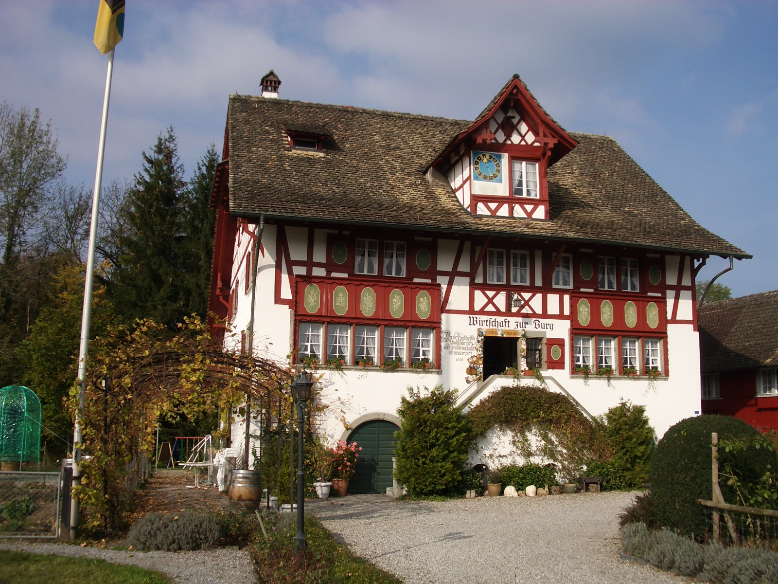 Meilen ZH, Switzerland, self-made, November 2006